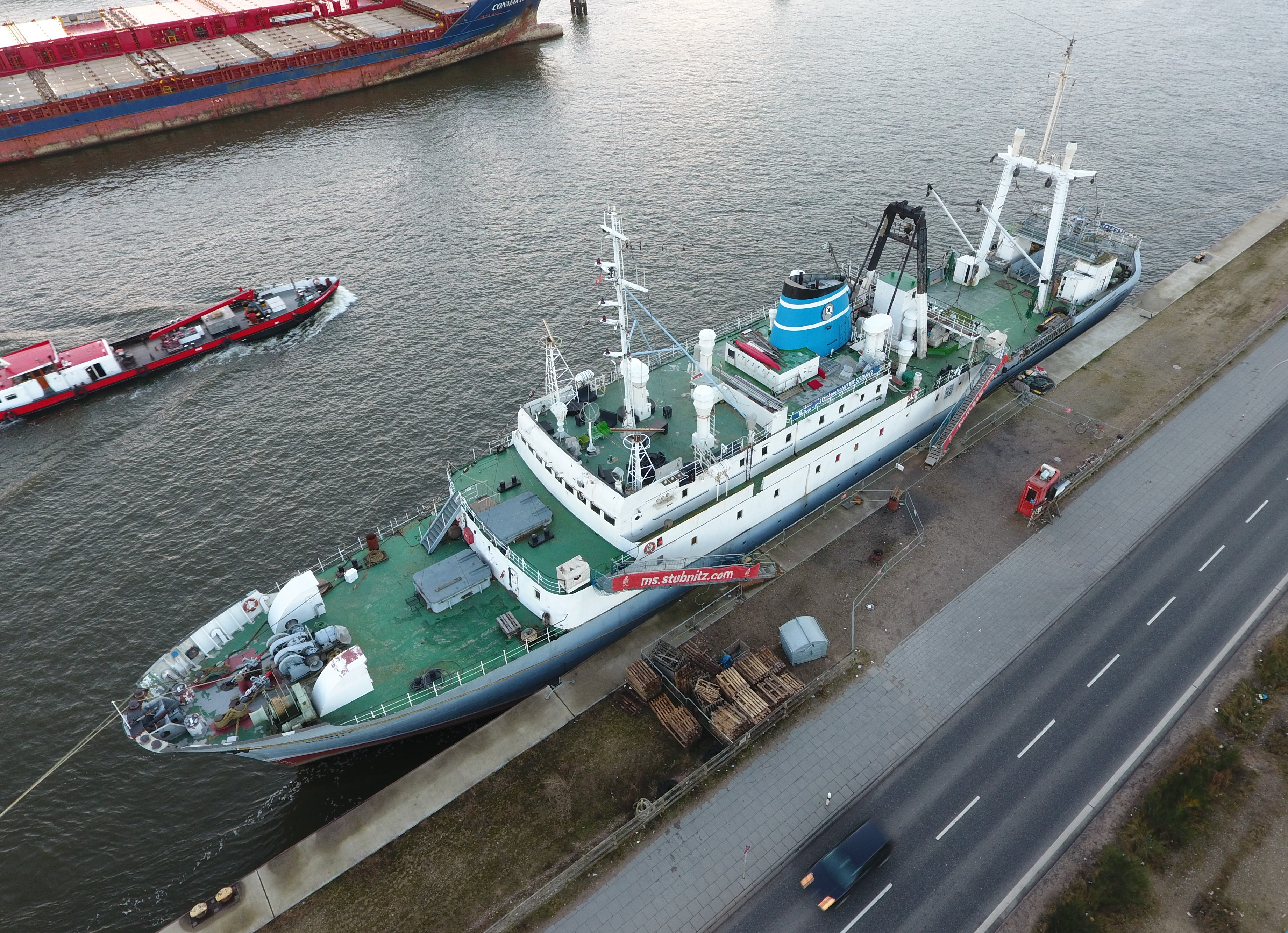 Die Stubnitz im Hamburger Hafen (HafenCity)